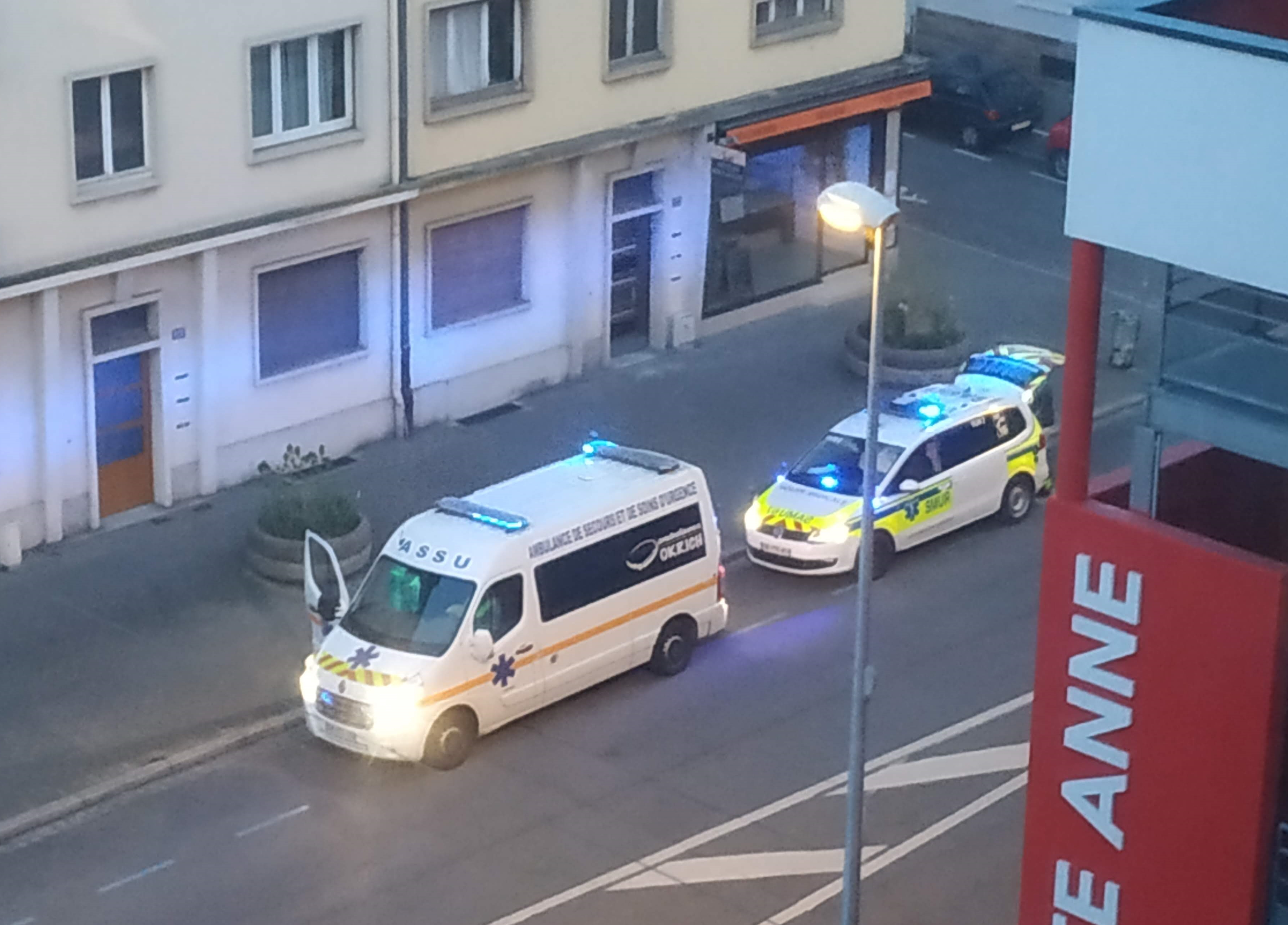 Intervention SAMU et d'une ambulance pour récupération d'un patient COVID-19 à Strasbourg Neudorf